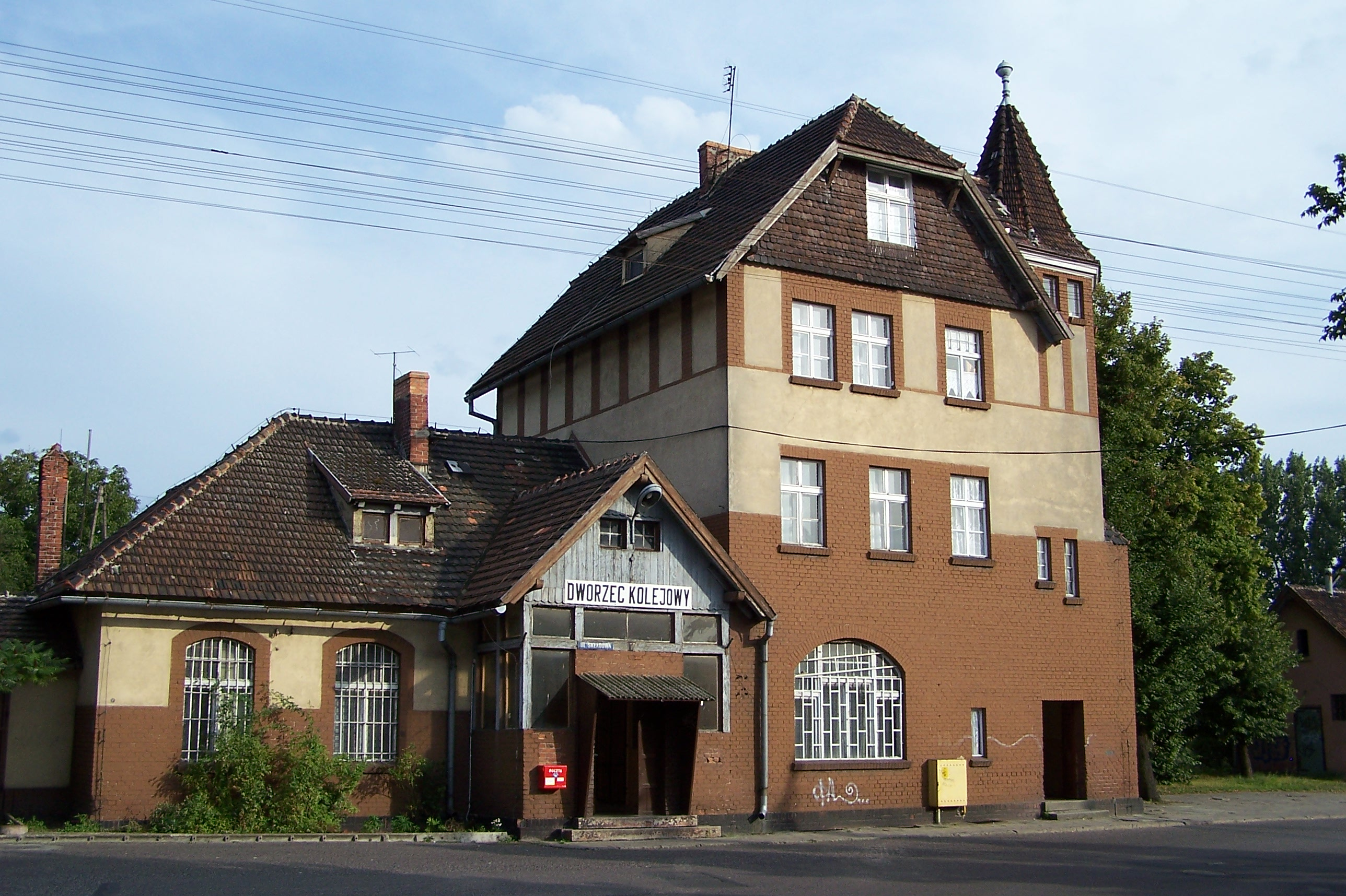 Stacja kolejowa Stęszew - dworzec